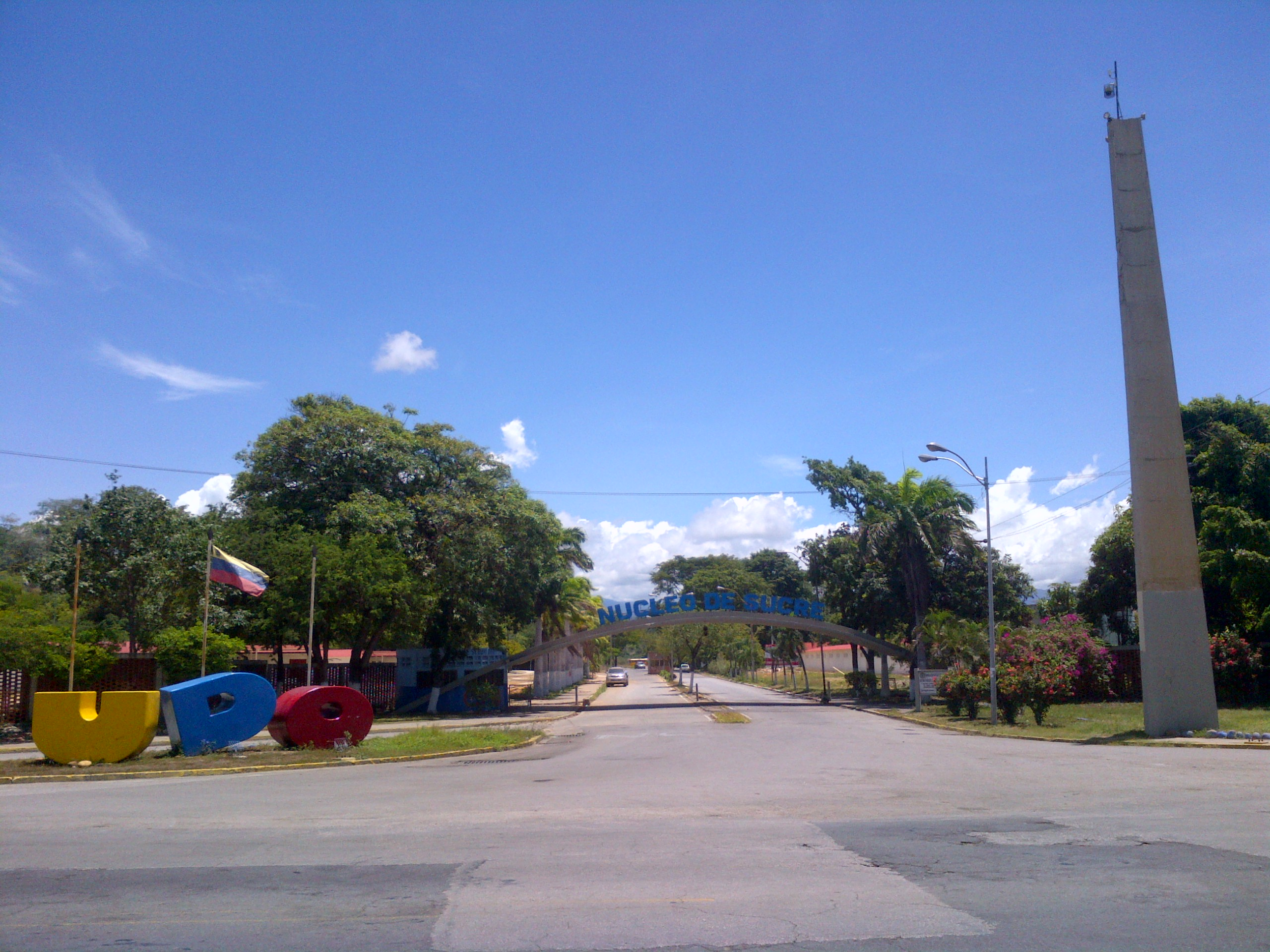 Entrada de la Universidad de Oriente Núcleo de Sucre, sede principal del instituto, en Cumaná, Venezuela.